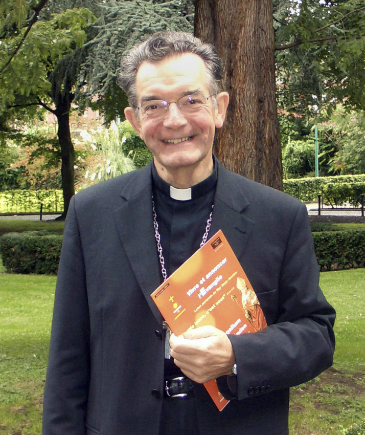 Aloys Jousten en septembre 2006